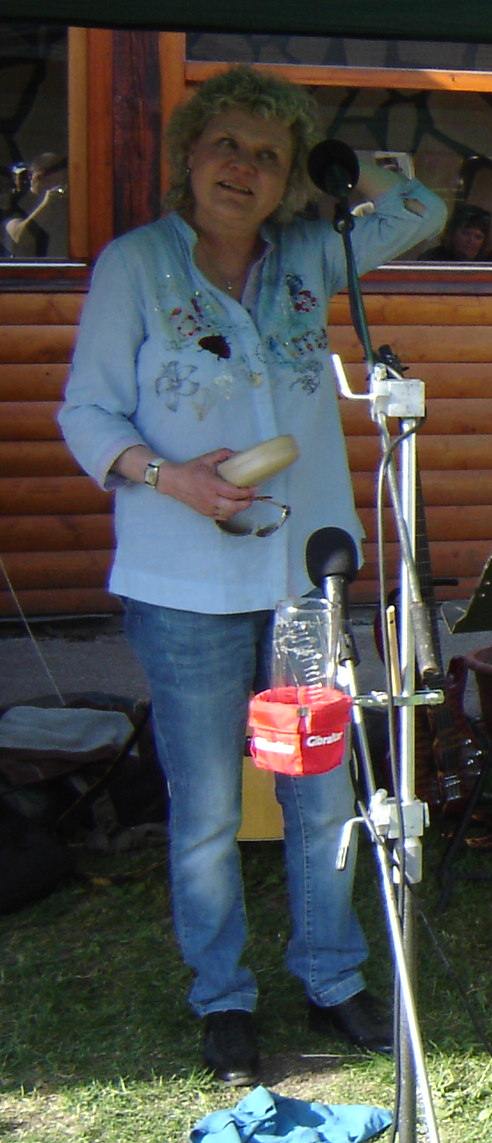 Karina Havlů 26.5.2012 - porotce na 8.ročníku Gulášfestu, Soukeník (Tábor).